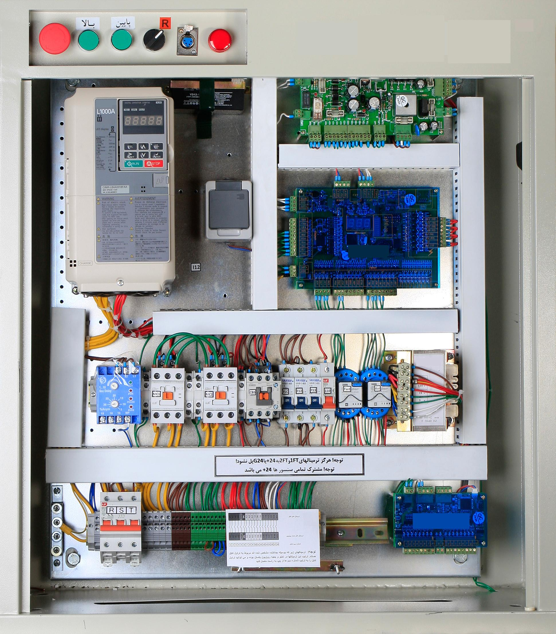 تابلو فرمان اسانسور